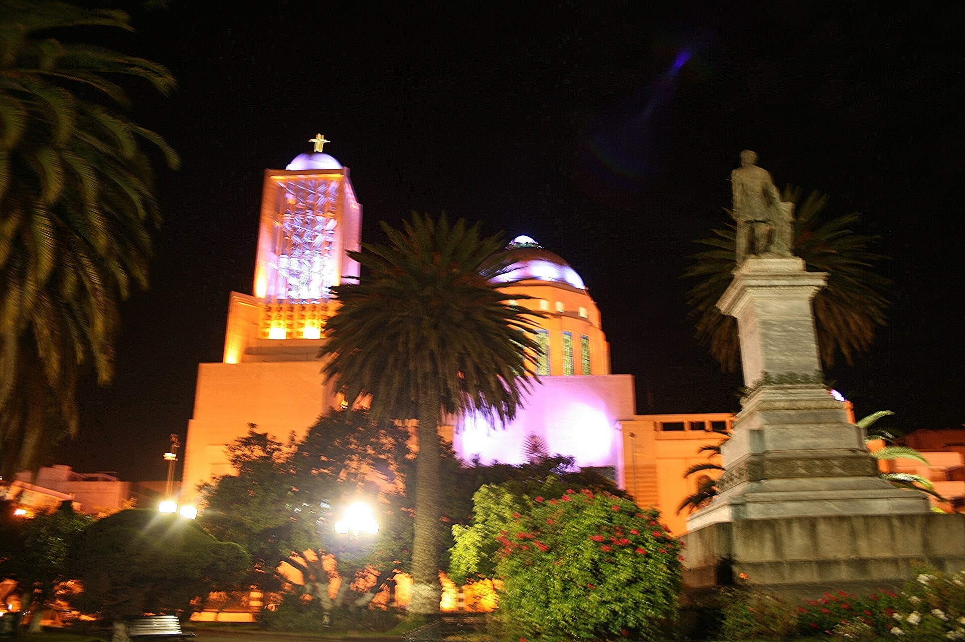 Catedral_de_Ambato